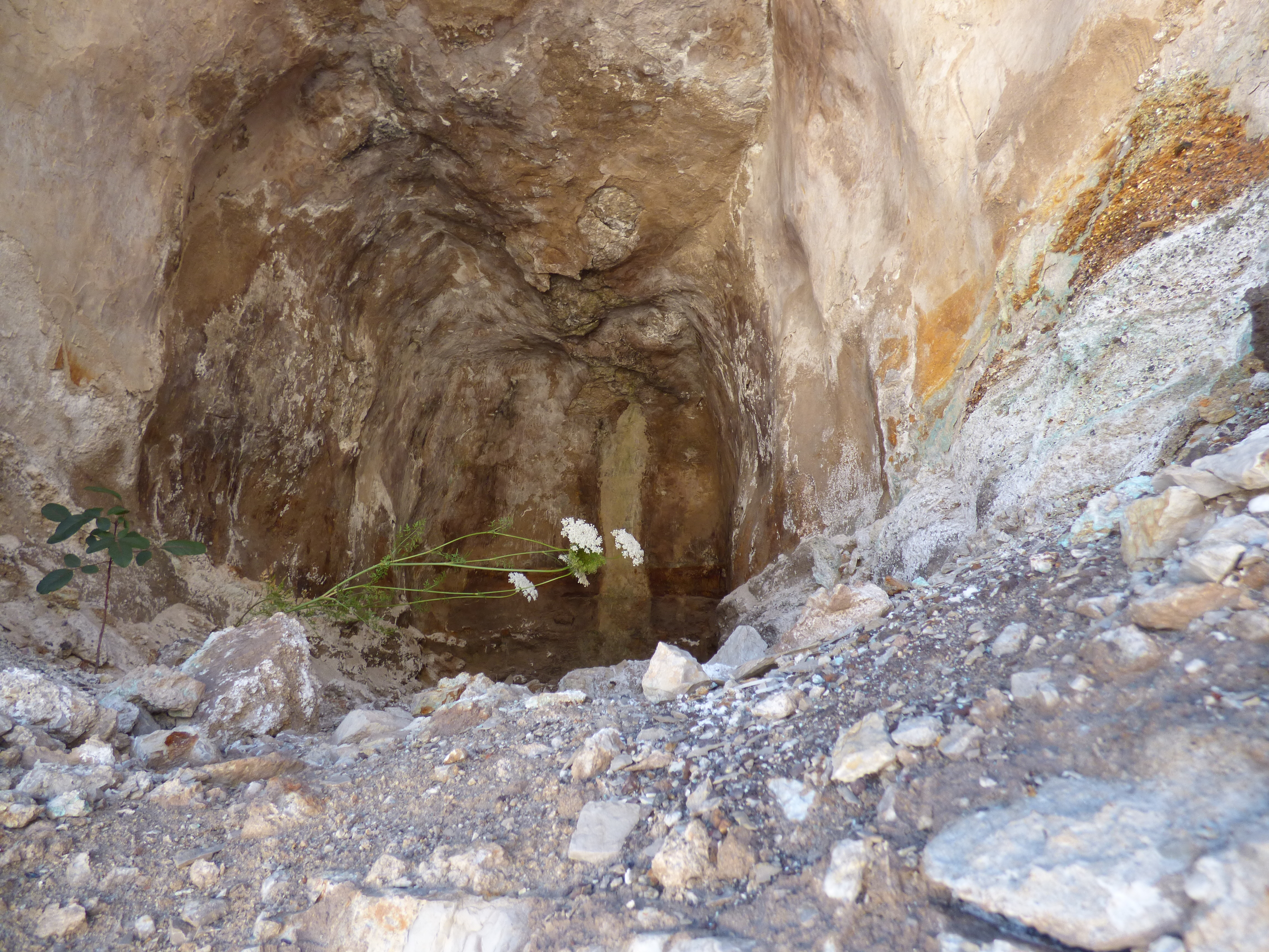 grotte datant du Néolithique située sur le site de dépollution des usines